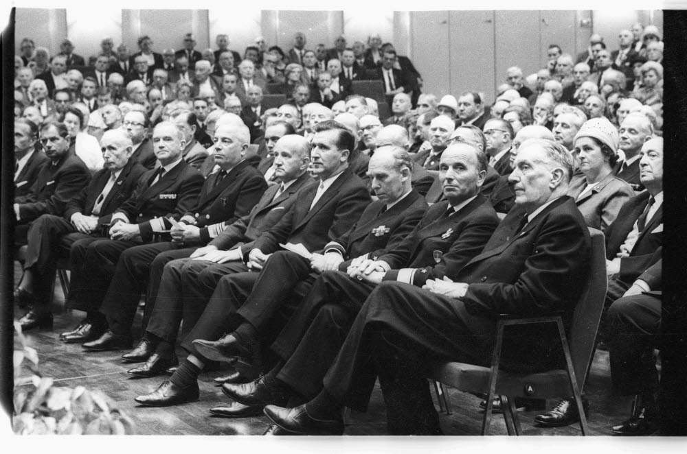 Feierstunde im Schloss. In der vorderen Reihe: Präsident des Deutschen Marinebundes Konteradmiral a.D. Ernst Lucht (1.v.r.), Flottillenadmiral Otto Kretschmer, Oberbürgermeister Günther Bantzer (4.v.r.).